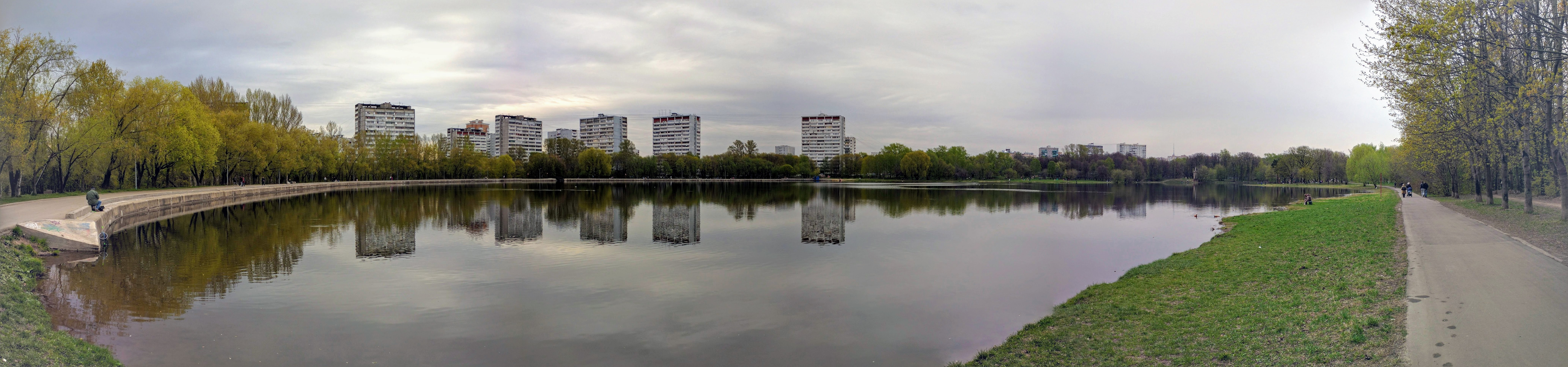 Панорама Головинского парка, Большой Головинский пруд